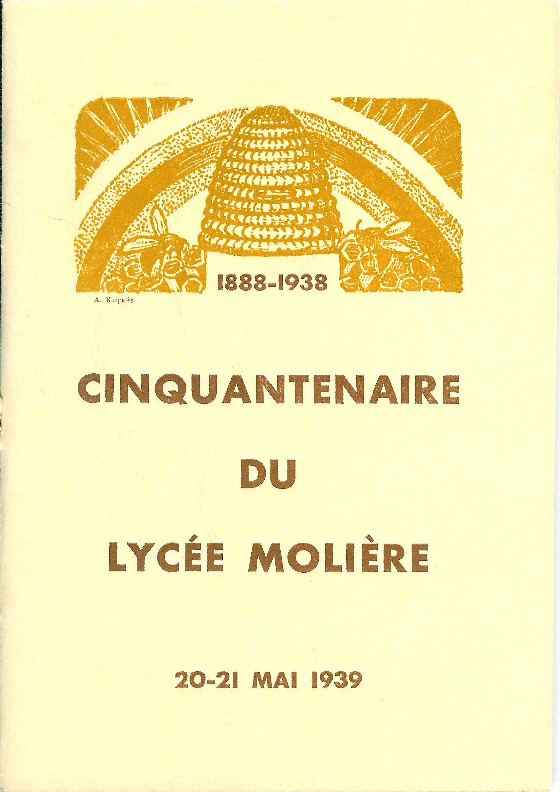 Une du bulletin du cinquantenaire du lycée Molière (1939)